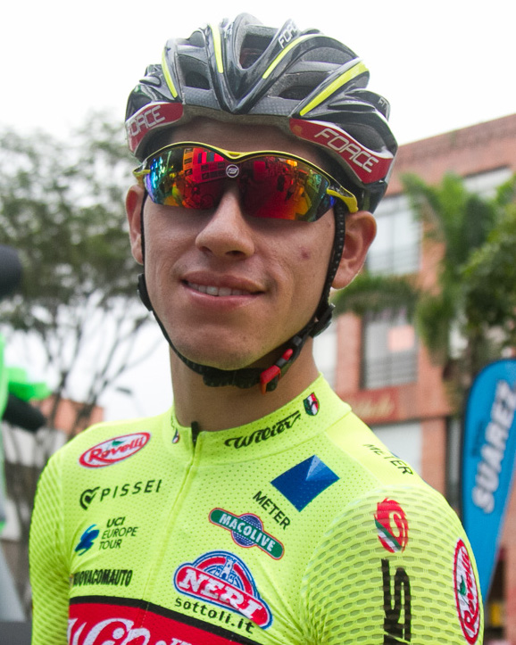 Miguel Flórez Campeonato Nacional de Ruta 2018 Medellín, febrero 4 de 2018.